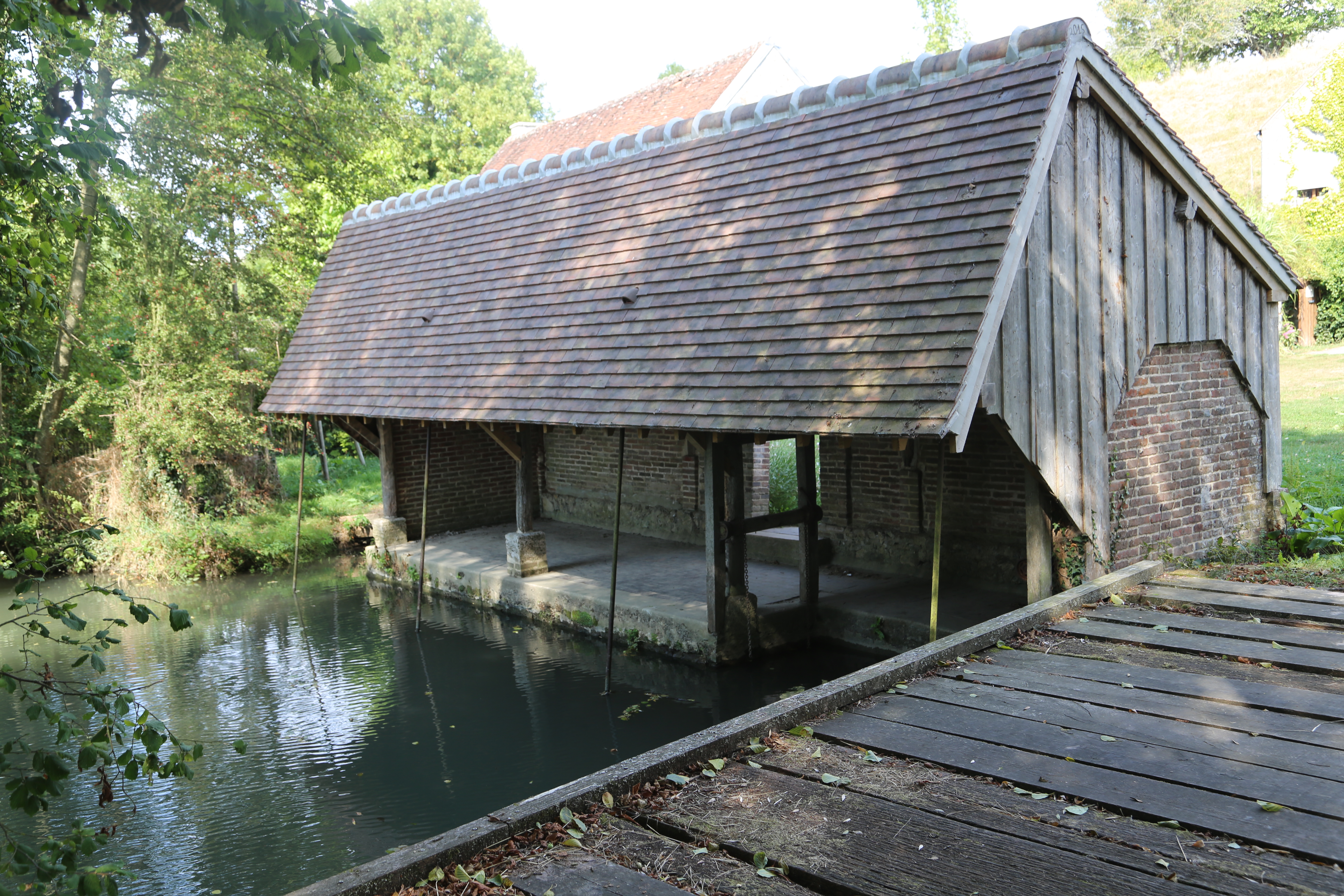 Lavoir Rue de la Huchette restauré par des bénévoles en 2015. Lavoir en briques et bardages en planches avec une toiture en tuiles plates de pays, il possède un plancher mobile.